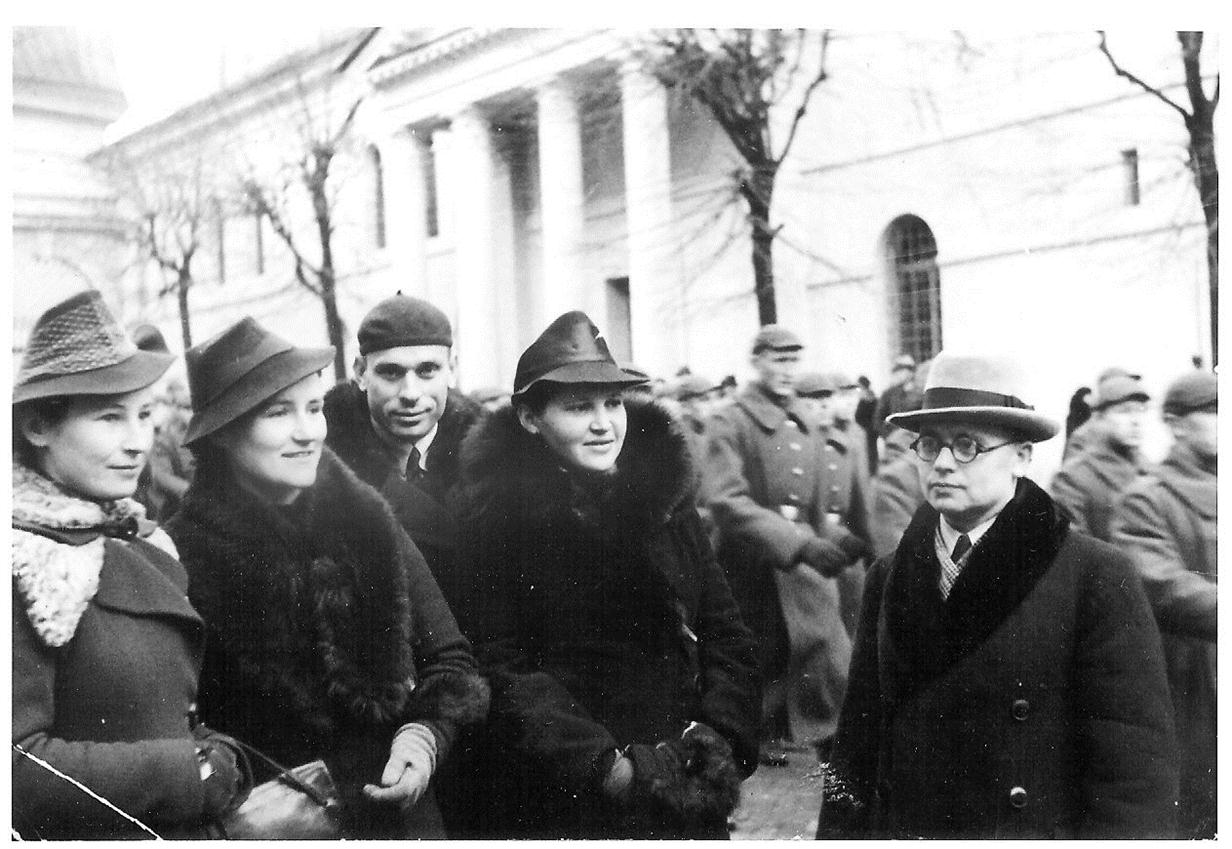 Silvestras Urbonas su žmona ir draugais 1939 Vilnius